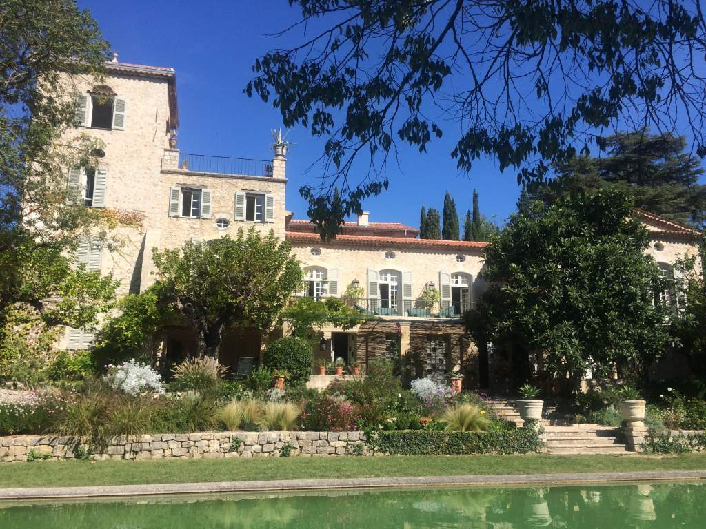 Chateau de La Colle Noire en 2016